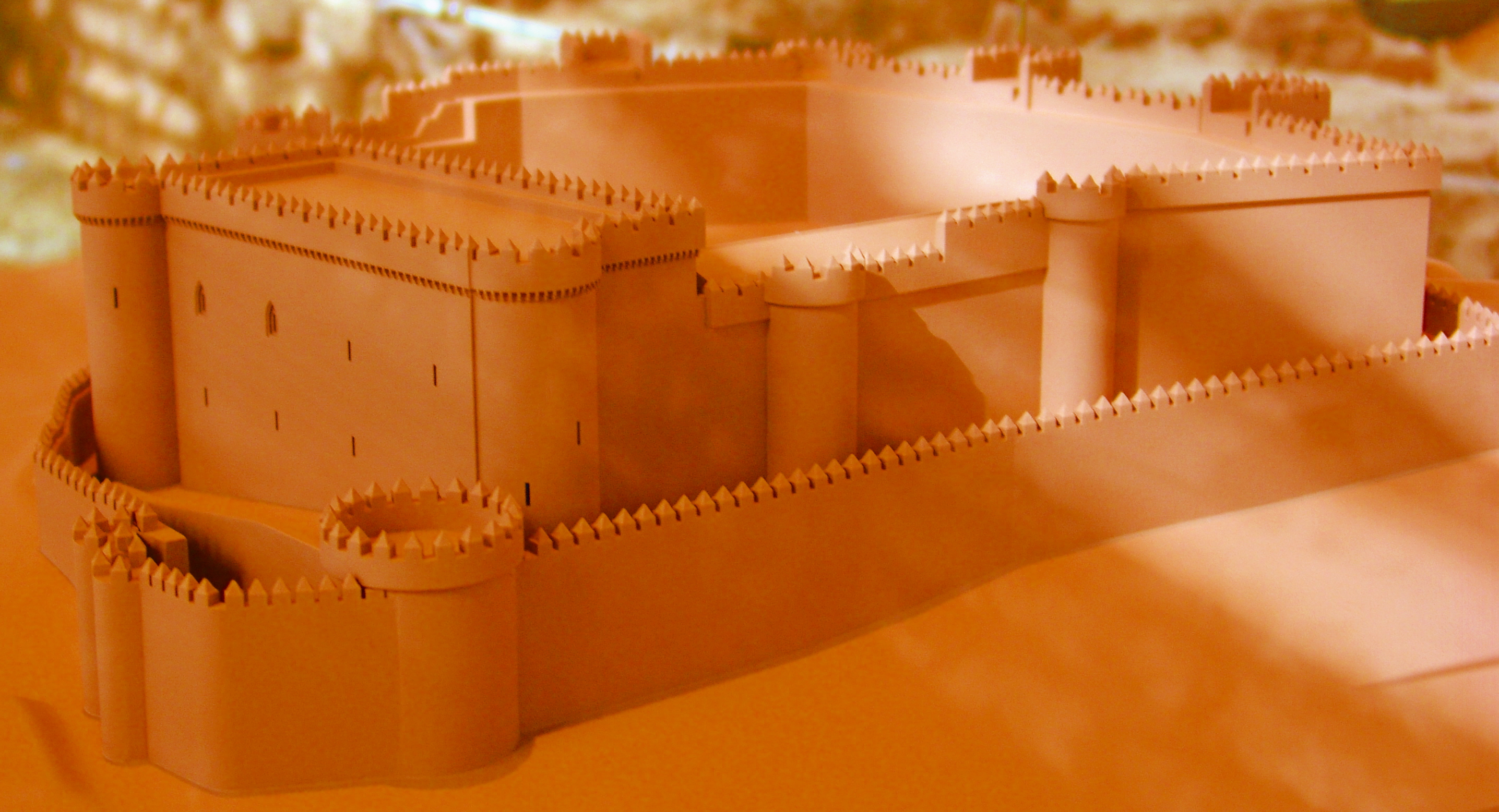 maqueta, Castillo, Burgos, España